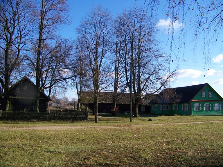 Dailininkės Veronikos Šleivytės paveikslų galerija